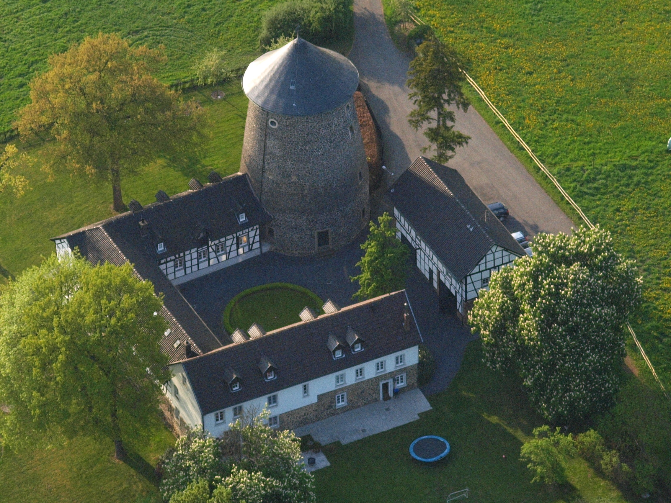 Villip, Windmühlenturm mit umliegenden Gebäuden